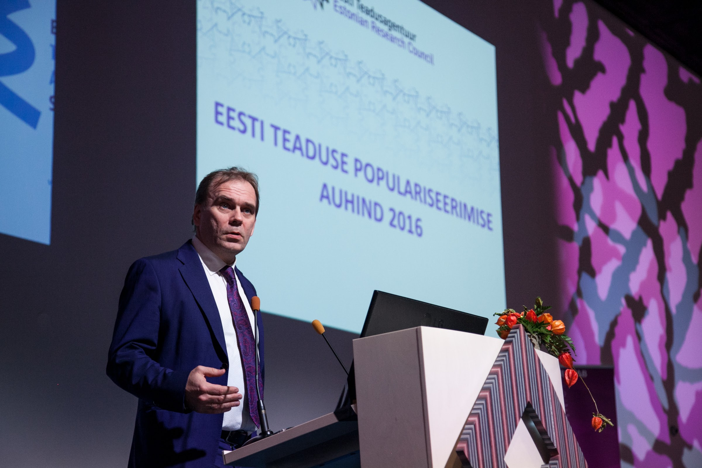 Indrek Reimand 2016. aasta teaduskommunikatsiooni konverentsil.